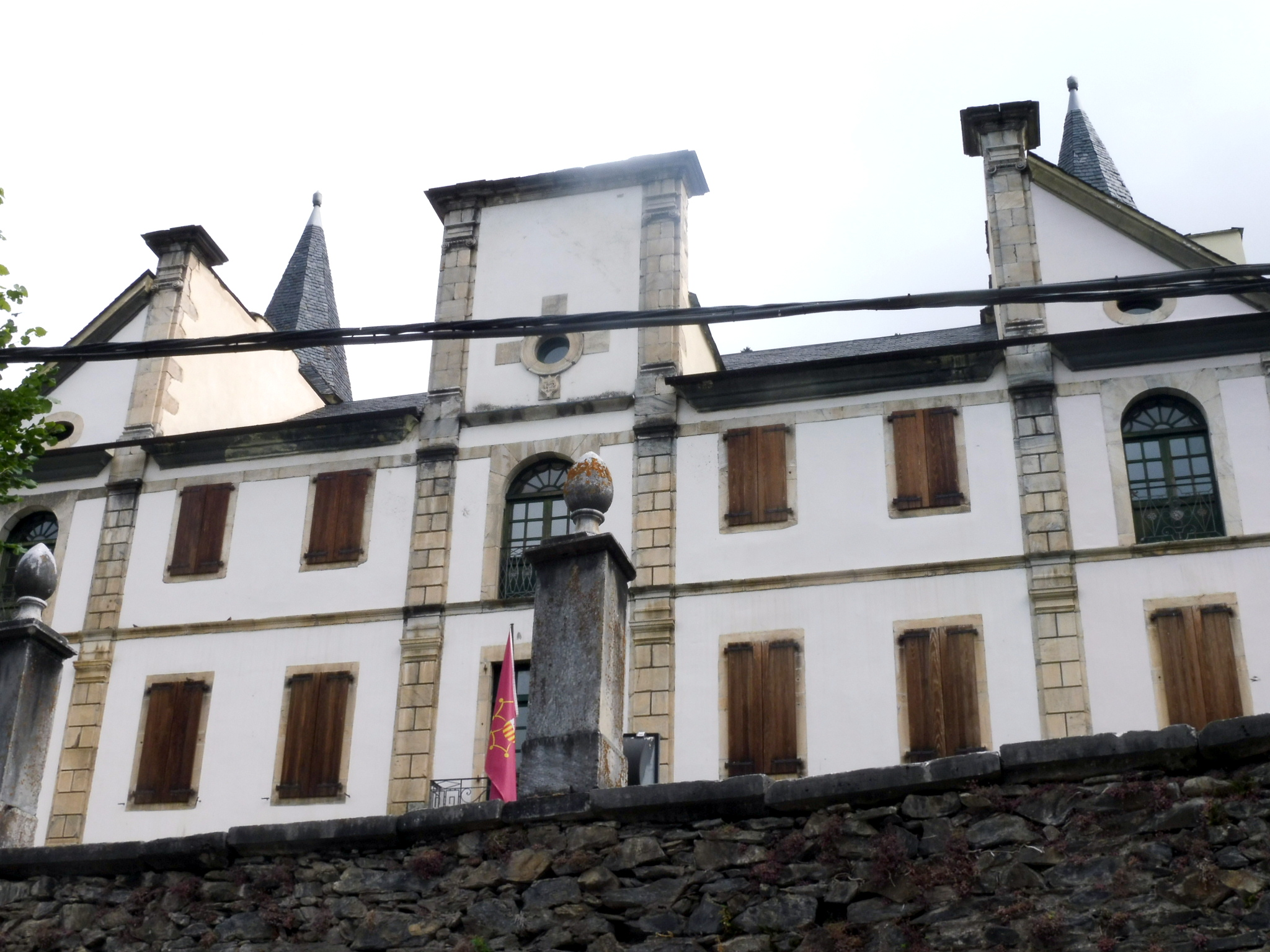 Casa Ademar d'Arròs (Vielha e Mijaran)